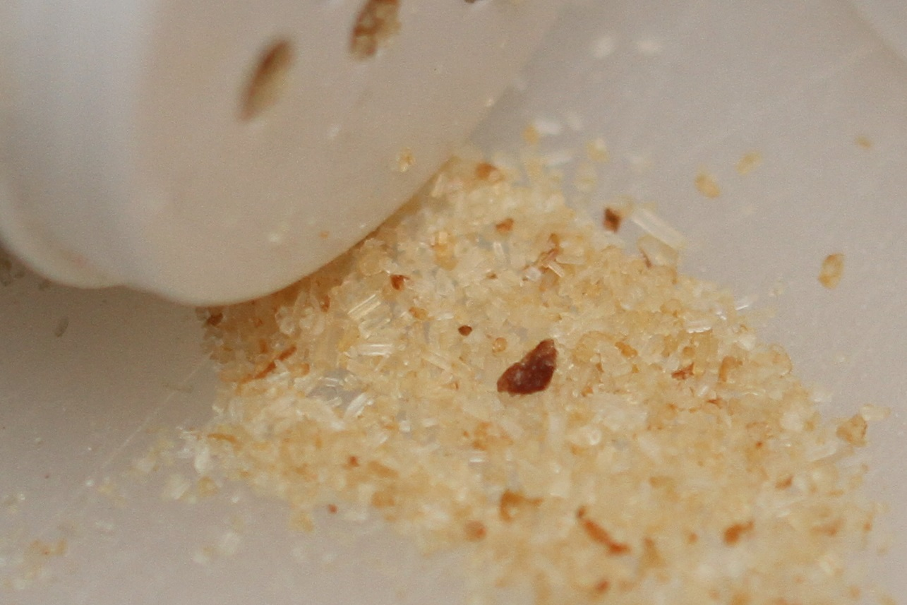 Gastromat